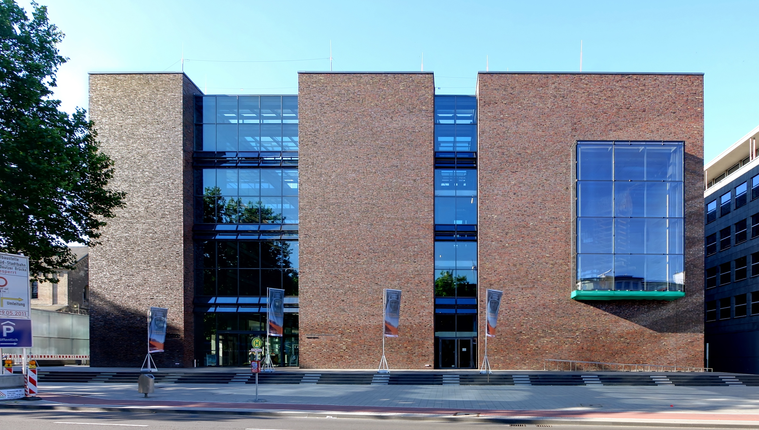 Kulturquartier Köln - Vorderseite Cäcilienstraße. Hier befindet sich der Eingang zum Rautenstrauch-Joest-Museum und dem Schnütgen-Museum